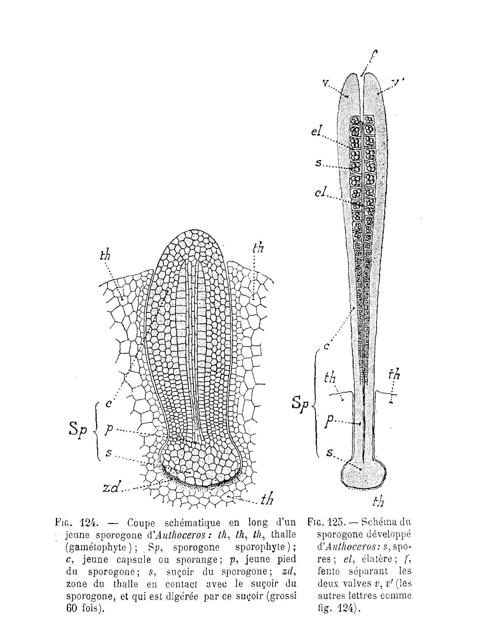 Anthoceros - sporogone